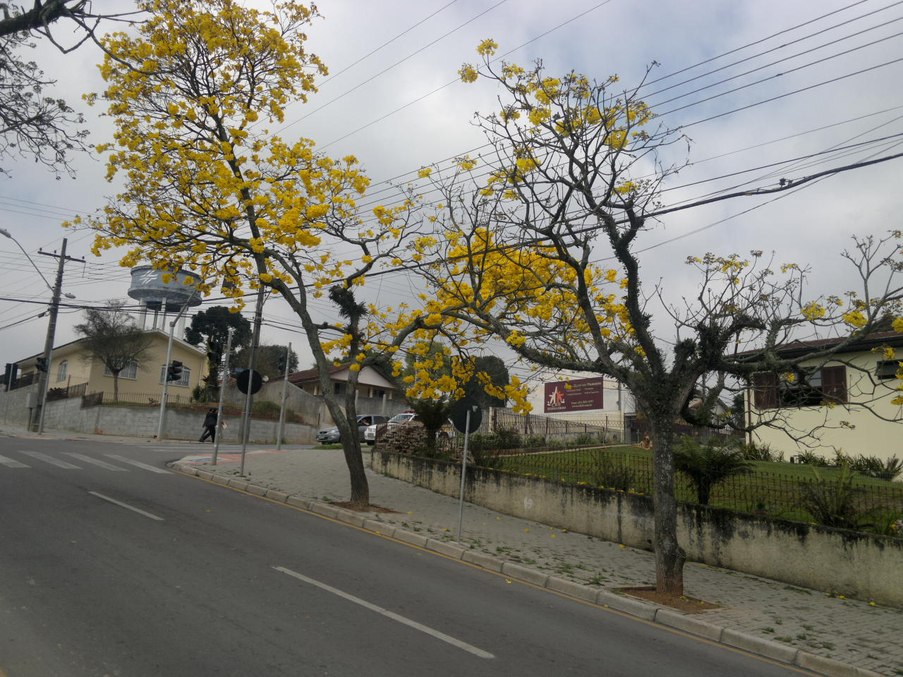 Ipês-amarelos usados na arborização de Araucária-PR